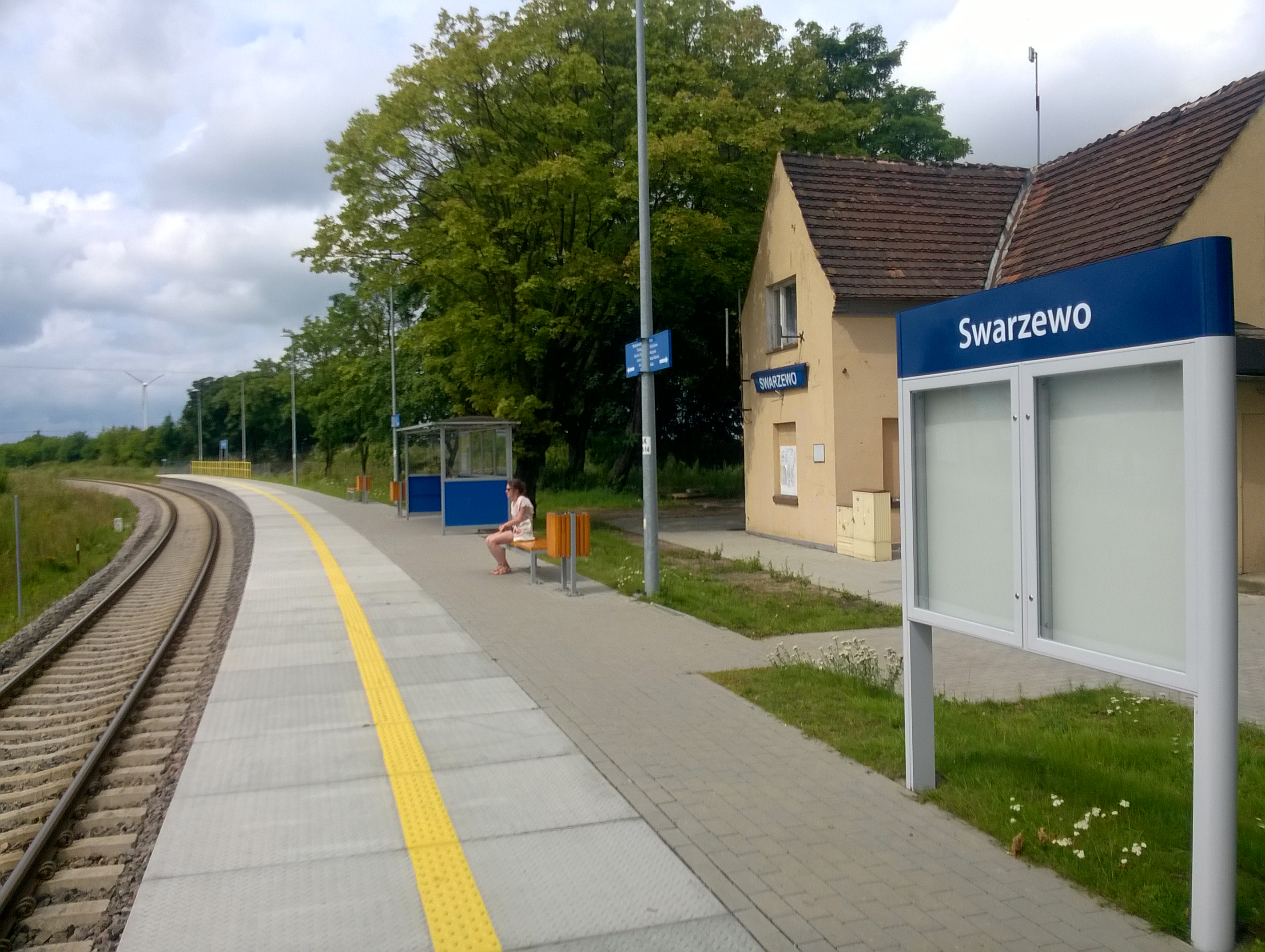 Przystanek osobowy Swarzewo